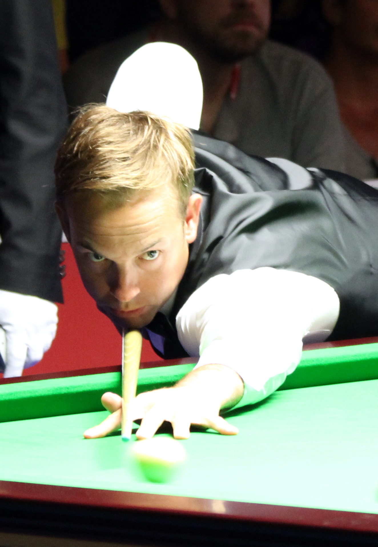 Allister Carter beim Paul Hunter Classic 2016